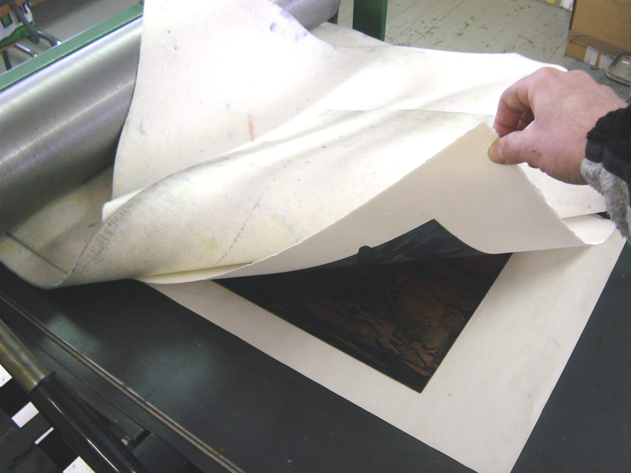 Intaglio printmaking.